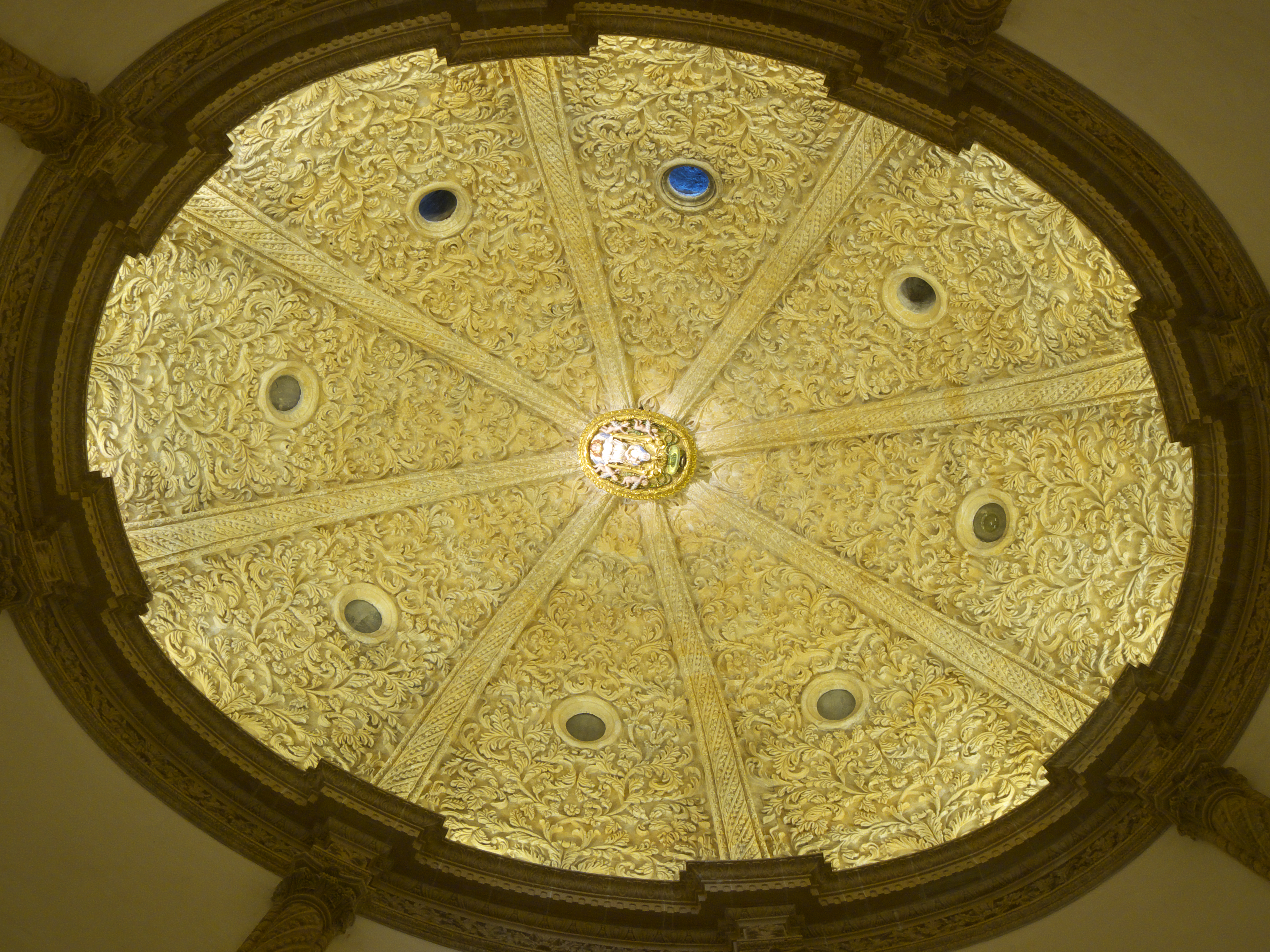 Cúpula elíptica de la Sala Capitular (1696-1701). Probablemente, el autor es Francisco de Herrera